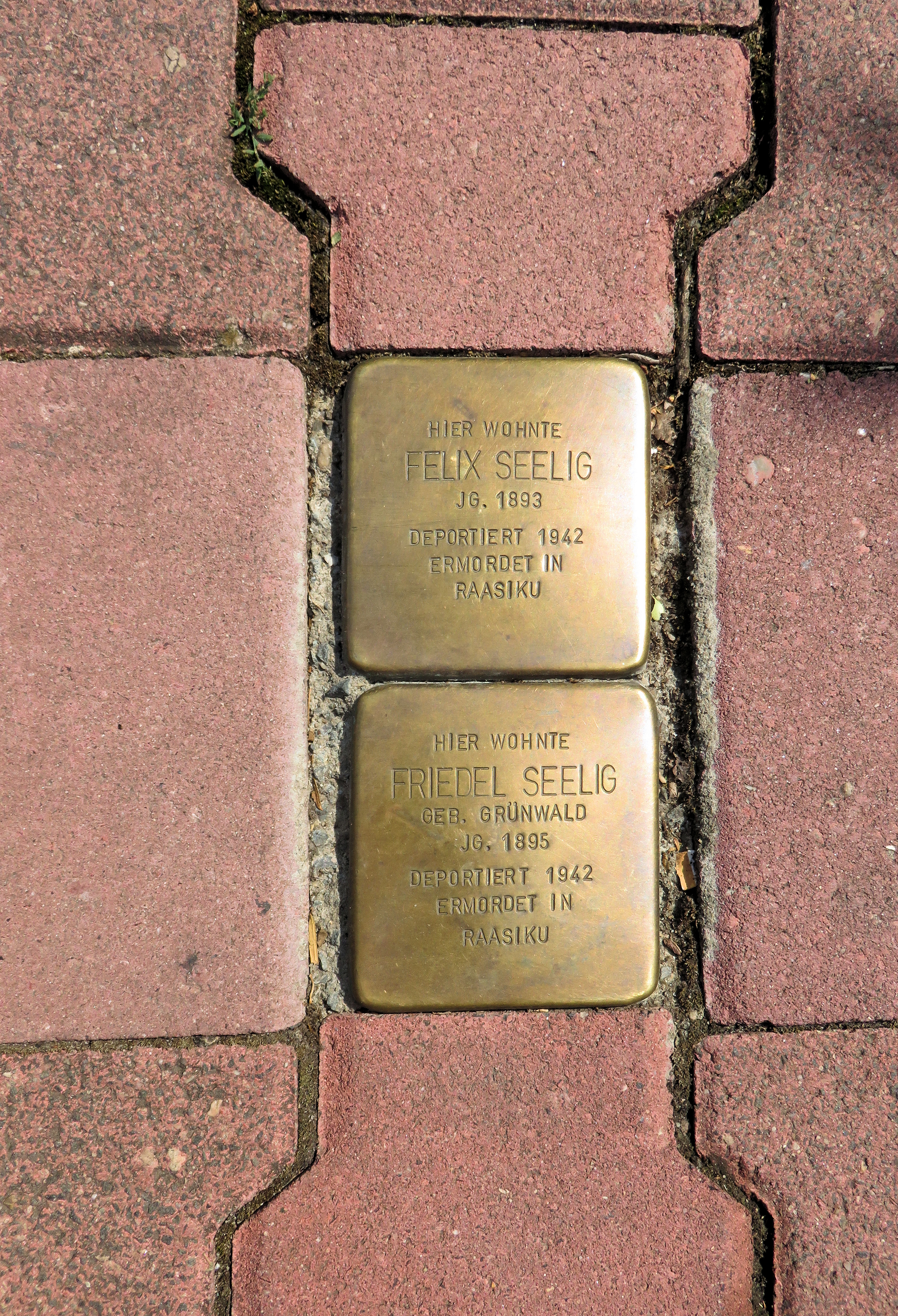 2 Stolpersteine in Frankfurt-Heddernheim, Hessestrasse 30. Verlegt vor der Fassade des Hauses Hessestraße 36